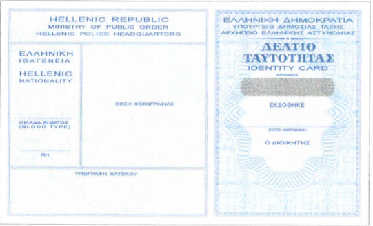 Η μπροστινή όψη του Ελληνικού Δελτίου Ταυτότητας. The front of the standard Greek Identity Card.